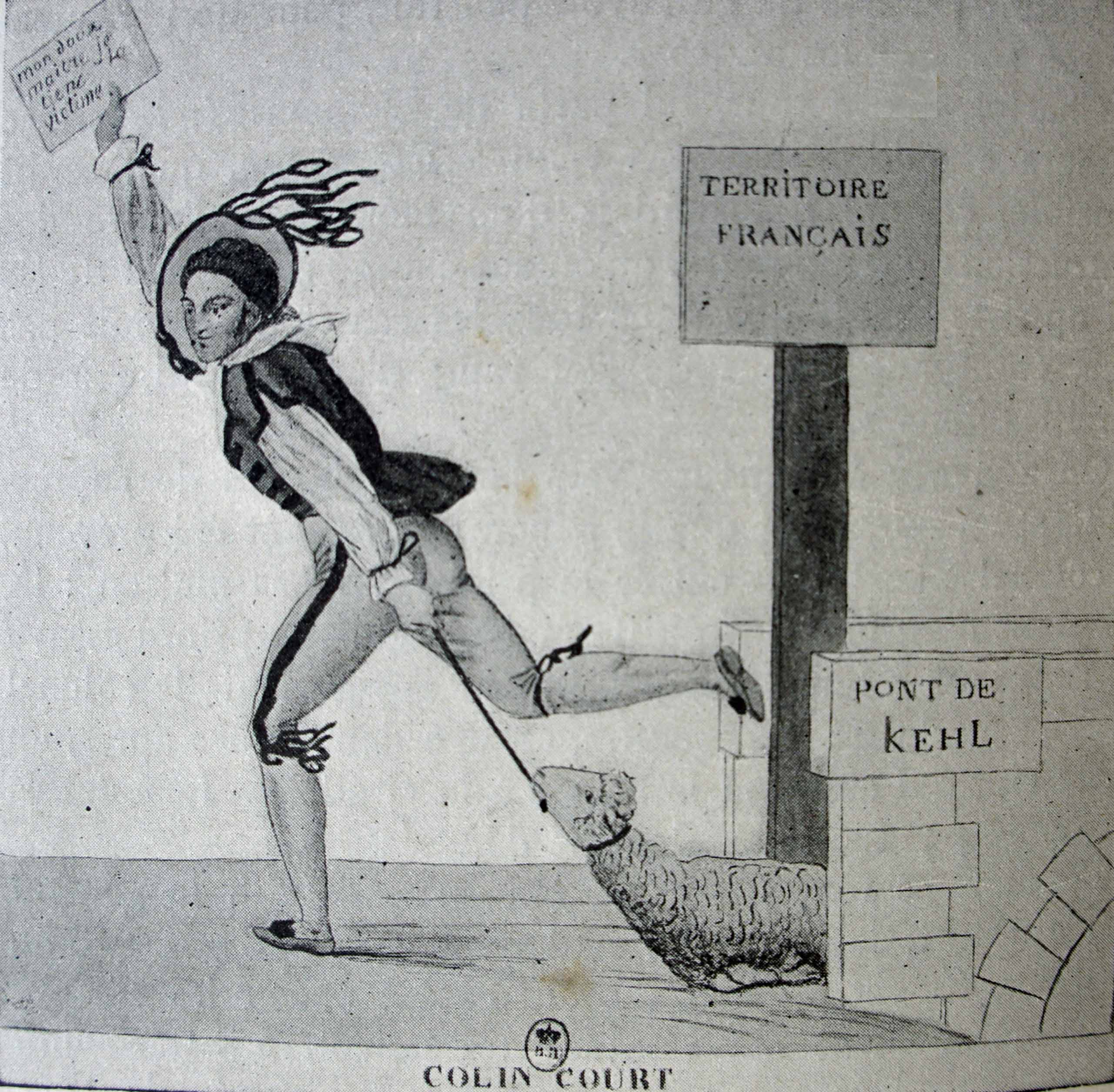 Colin Court en refranchissant le pont de Khel avec l'agneau sacrificiel dans l'affaire duc d'Enghien.